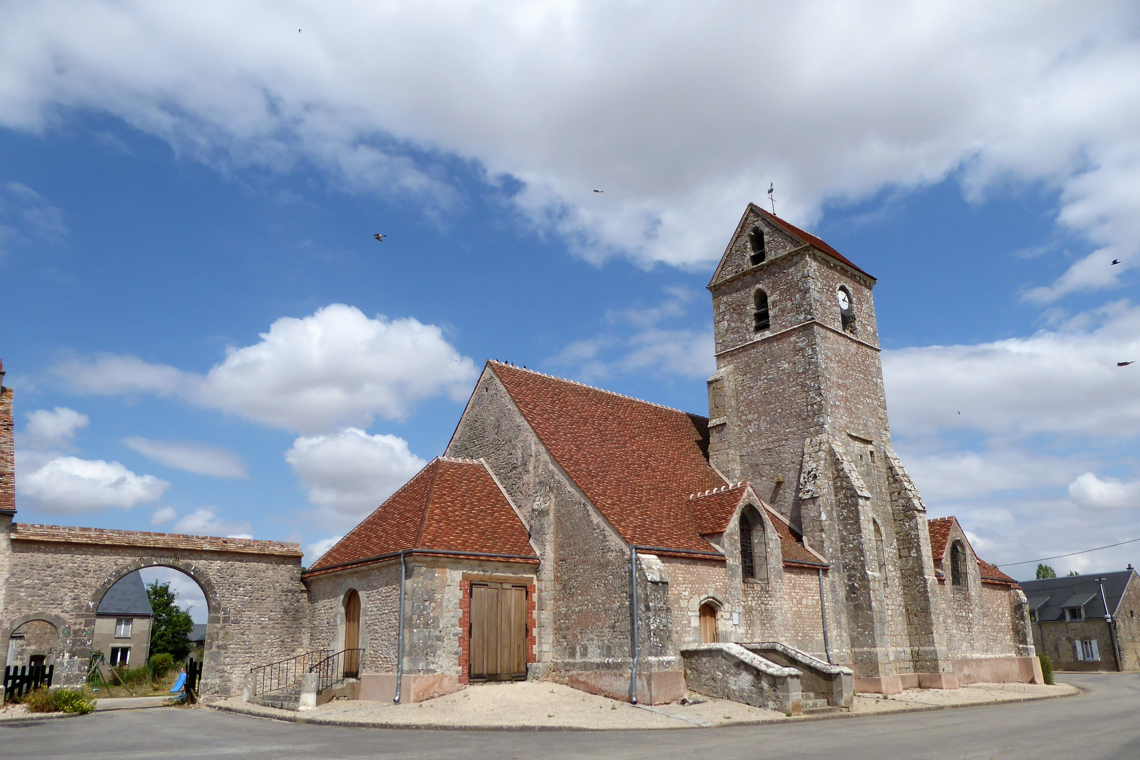 église Saint-Pierre de Trancrainville, Eure-et-Loir, France.